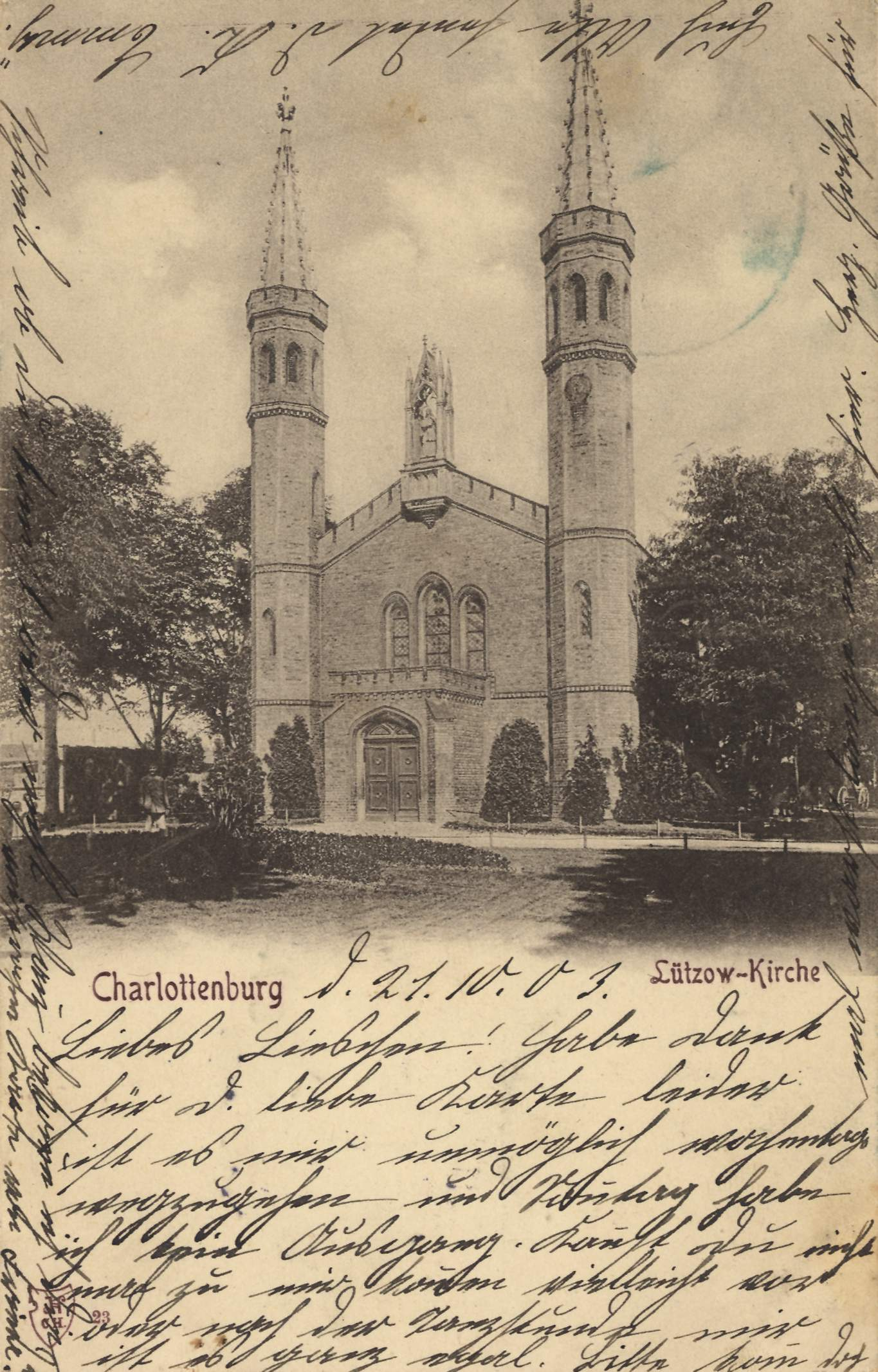 Lützow-Kirche (heute Evangelische Kirche Alt-Lietzow). Dieser dritte Vorgängerbau, errichtet ab 1848–1850, stammte von dem Architekten Friedrich August Stüler. Das Gebäude wurde 1910/11 durch einen neobarocken Neubau ersetzt, der im Zweiten Weltkrieg zerstört wurde. Der heutige Bau stammt von 1960/61.